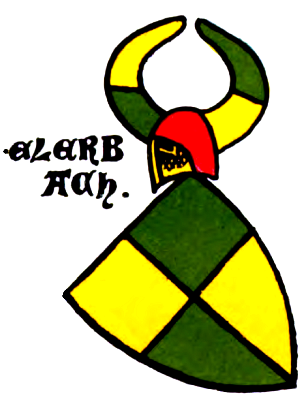 Wappen der Ellerbach (hier Elerbach)